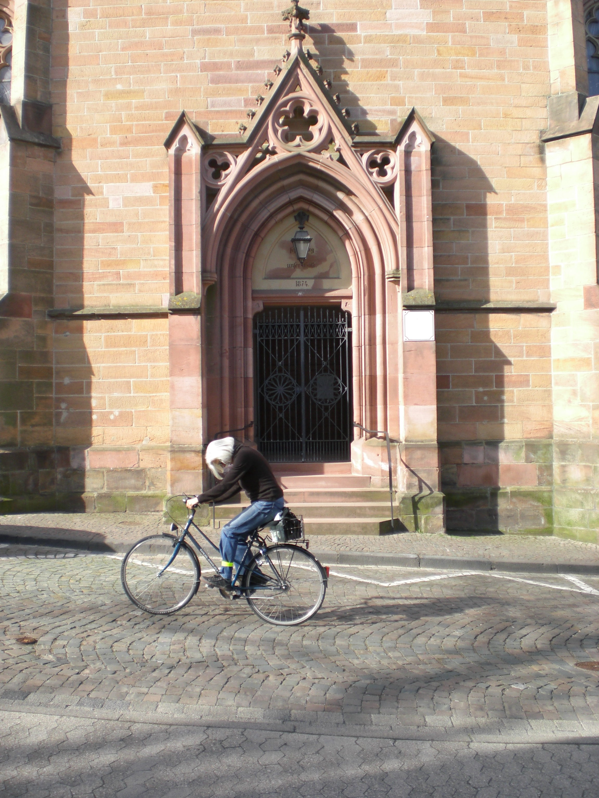 Protestantische Stadtkirche Homburg, Kirchenstraße, Eingangsportal